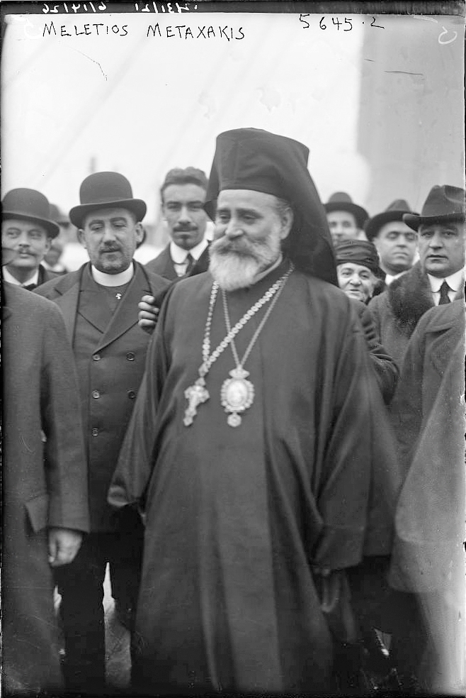 Meletios Metaxakis in New York, 1921